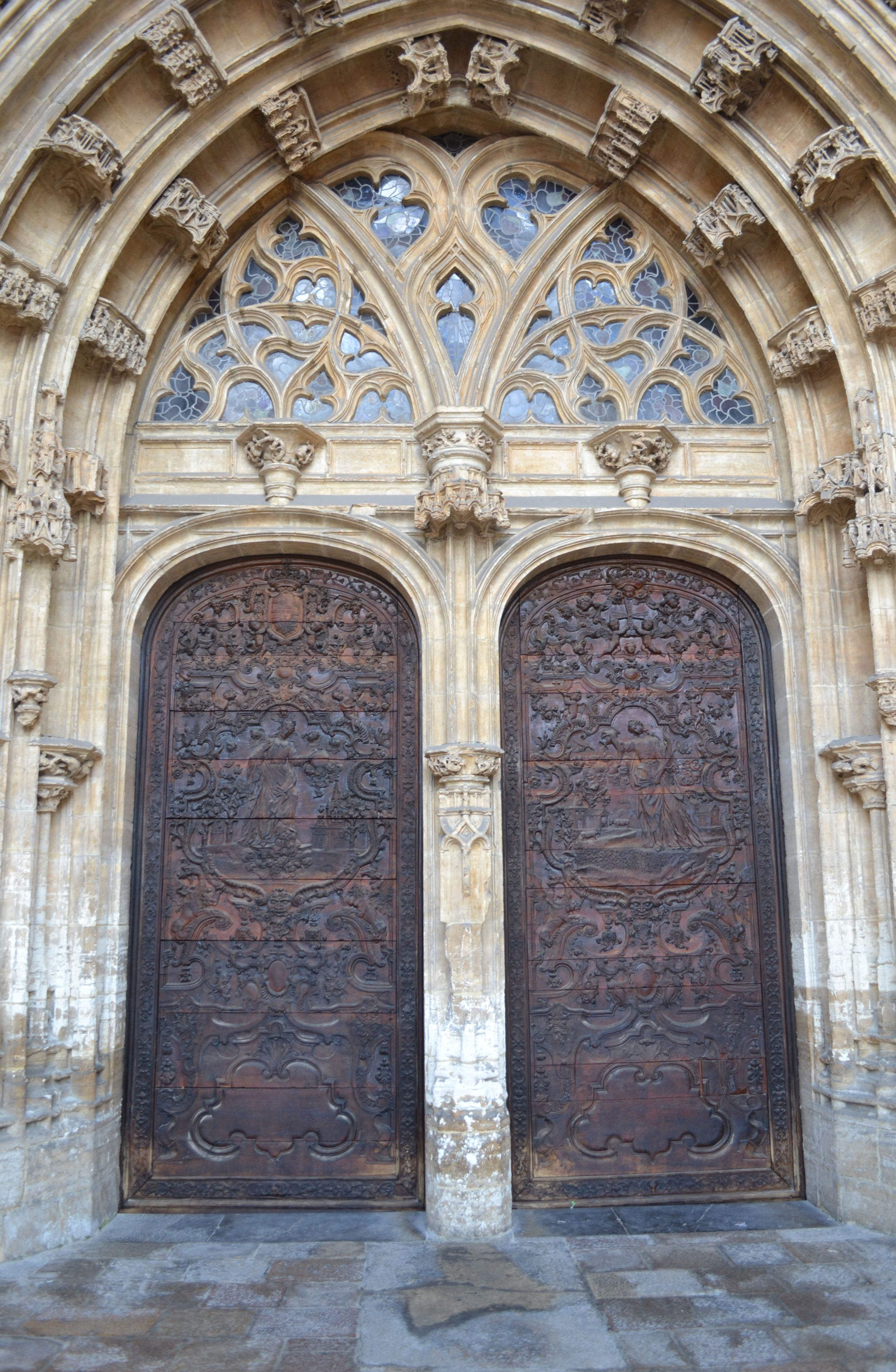 Por sus tallas de madera son conocidas como la del Salvador y la de Santa Eulalia de Mérida.